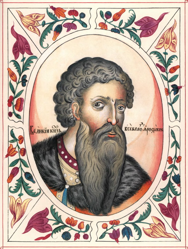 Великий князь Всеволод Ярославич. Портрет из Царского титулярника. 1672 год